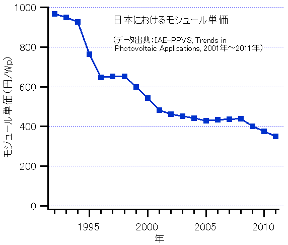 2011年のデータを追加しました。